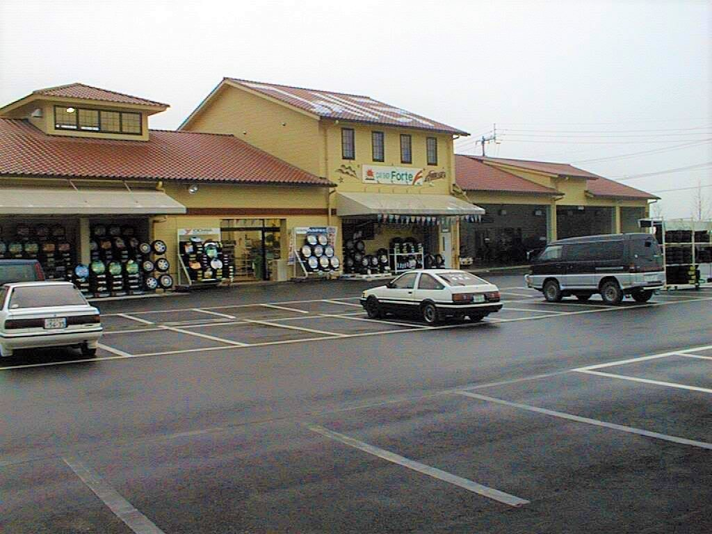 愛媛県西条市にあったフォルテ西条の自動車部品販売建屋